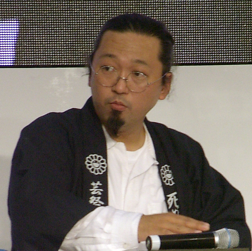 ▽GEISAI